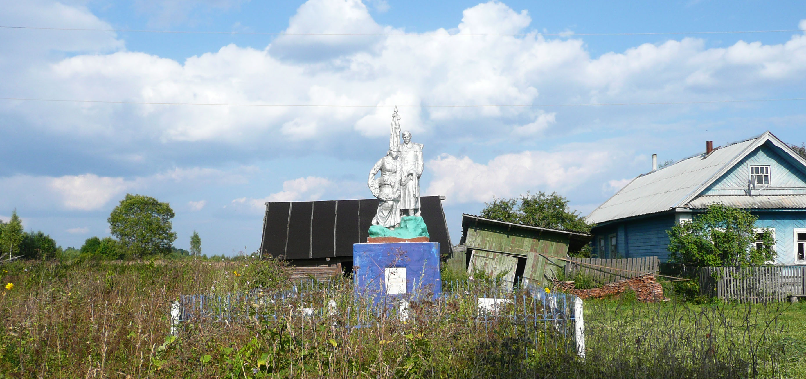 Памятник в Соколово Селижаровского района